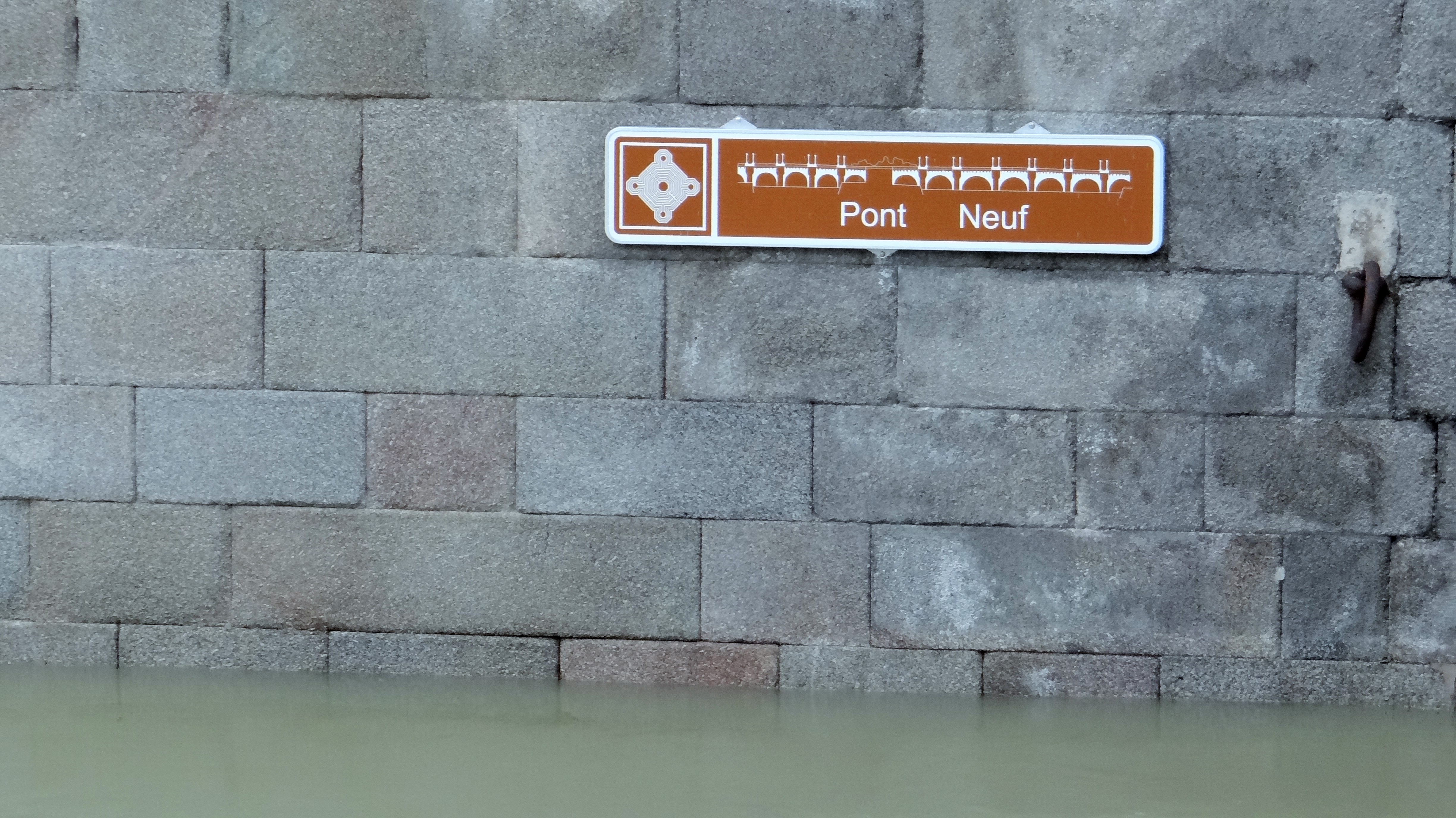 Pont Neuf, crue de la Seine 2018